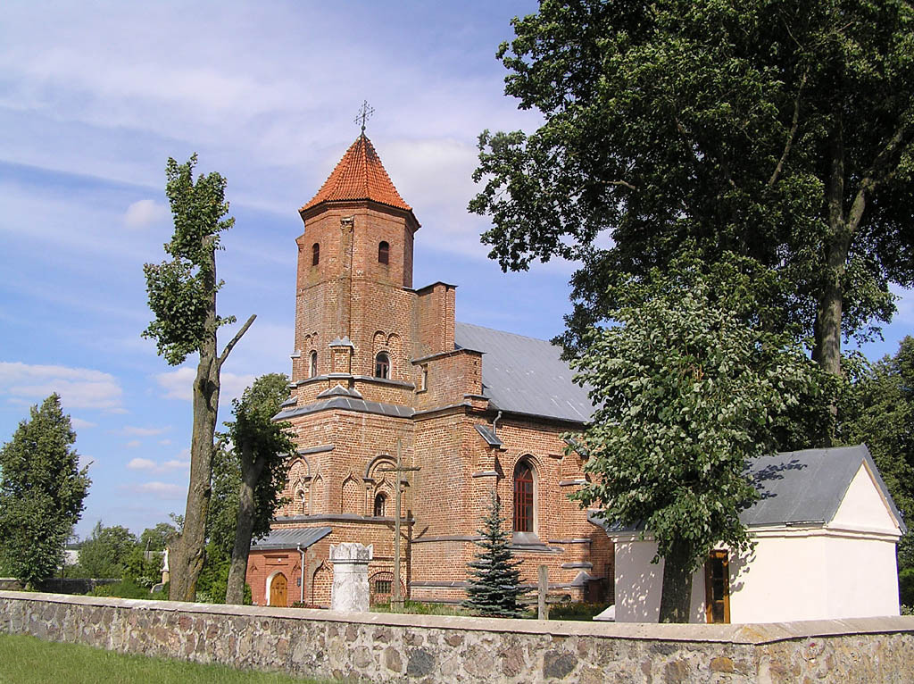 Беларуская (тарашкевіца): Гнезна